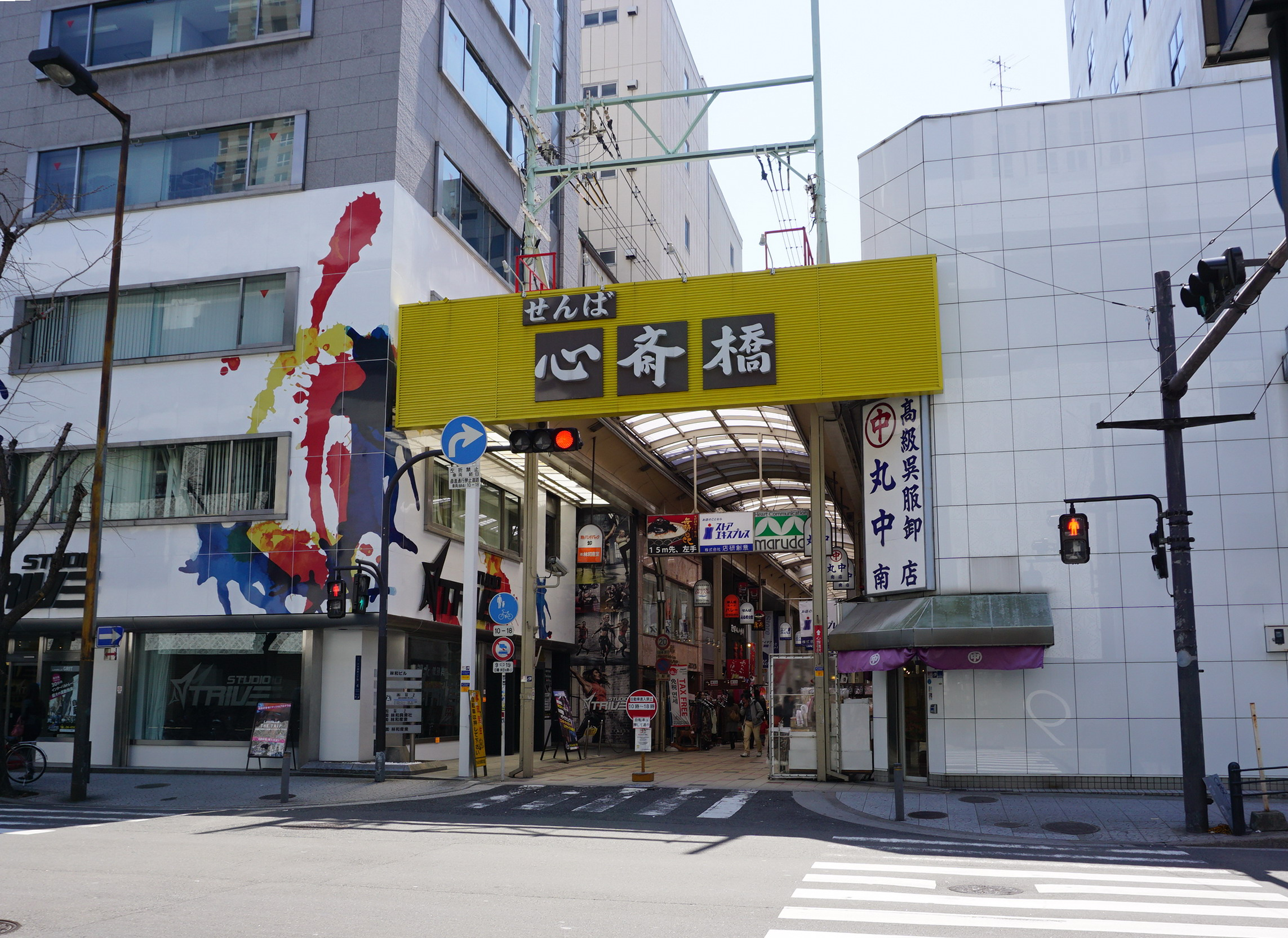 せんば心斎橋商店街